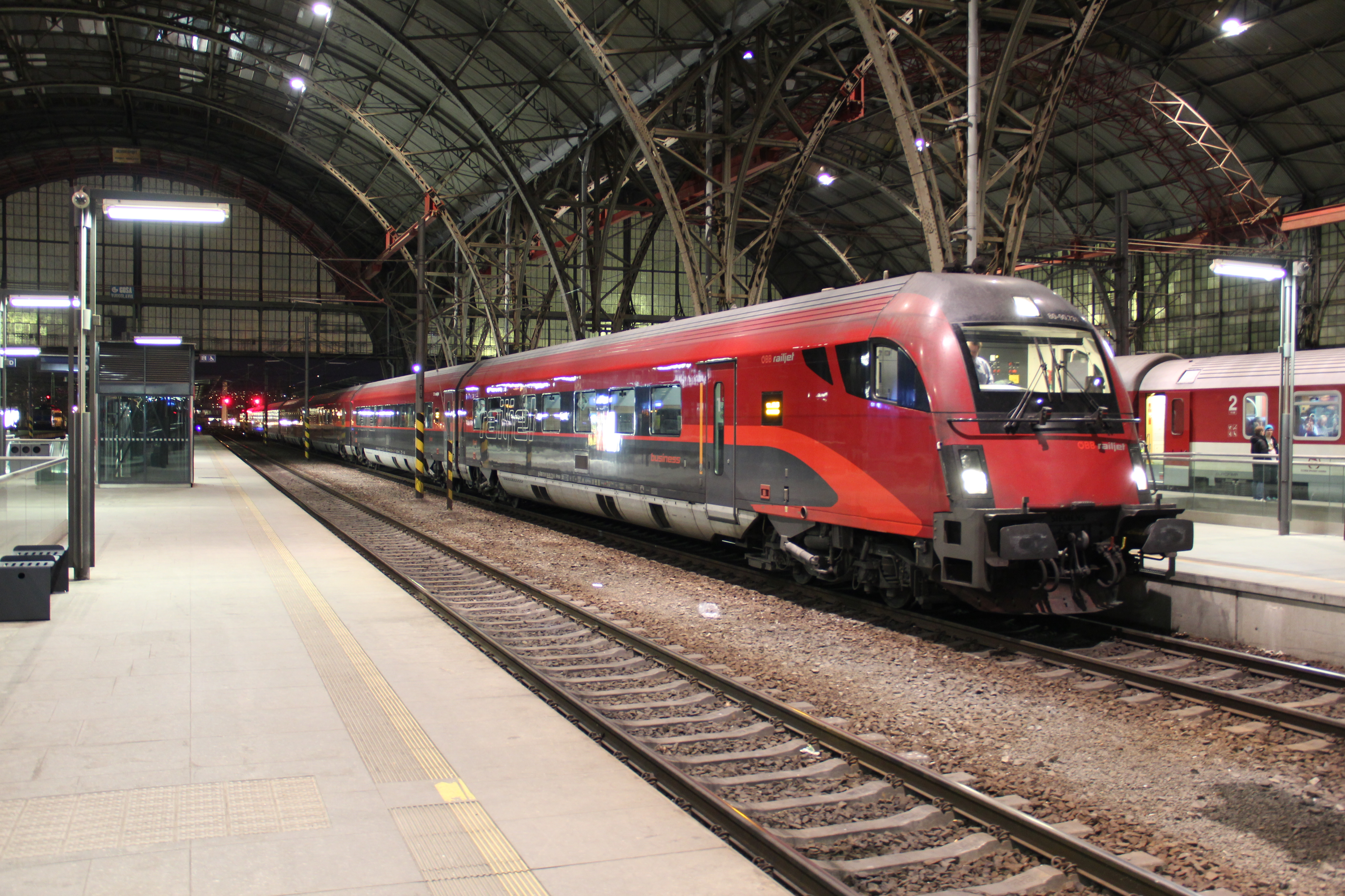 RJ 76 hat soeben den Zugendbahnhof Praha hl.n. erreicht.